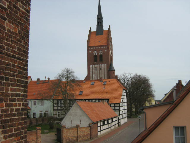 Die evangelische St. Marienkirche, davor die Präpositur.